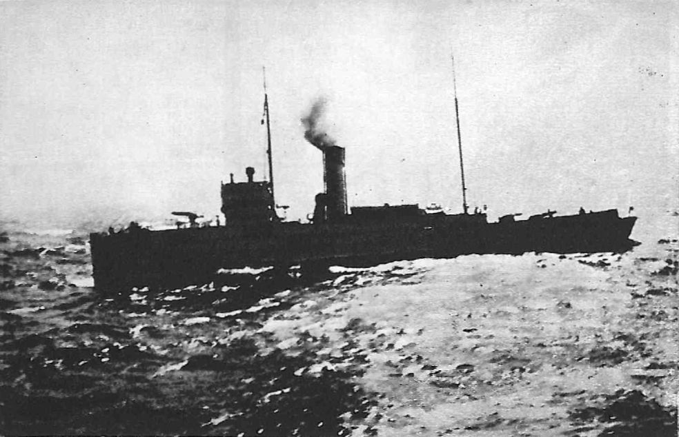 Kanonierka ORP "Komendant Piłsudski" w morzu.